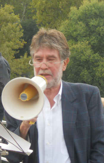 Roma, Ponte della musica